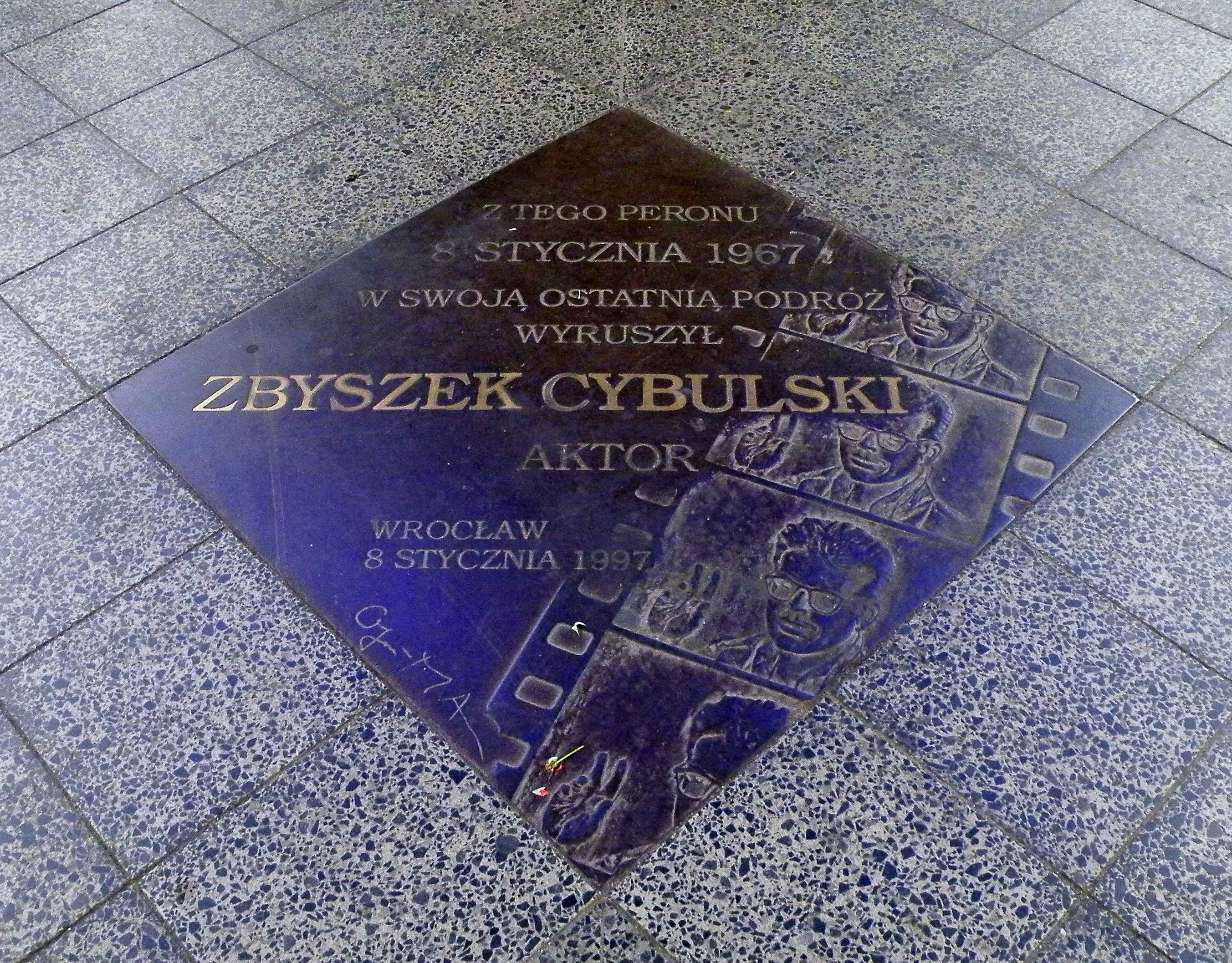 Tablica pamiątkowa na peronie 3 dworca Wrocław Główny upamiętniająca śmierć aktora Zbigniewa Cybulskiego This photo was taken during Railway Wikiexpedition 2014 set up by Wikimedia Polska Association in cooperation with Fundacja Grupy PKP.You can see all photographs in category Wikiekspedycja kolejowa 2014.